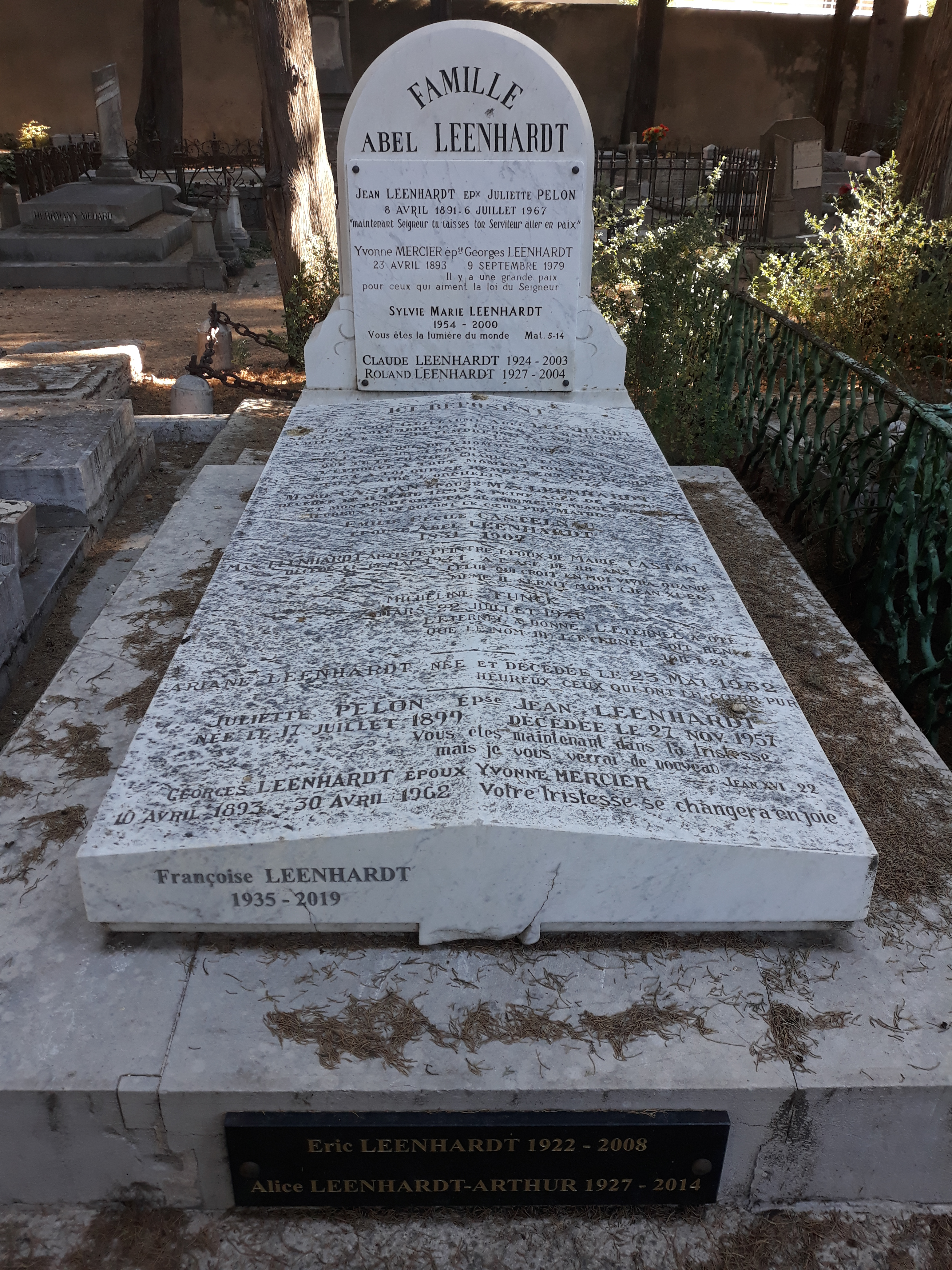 Das Grab des französischen Malers Max Leenhardt im Familiengrab auf dem Cimetière protestant Montpellier.